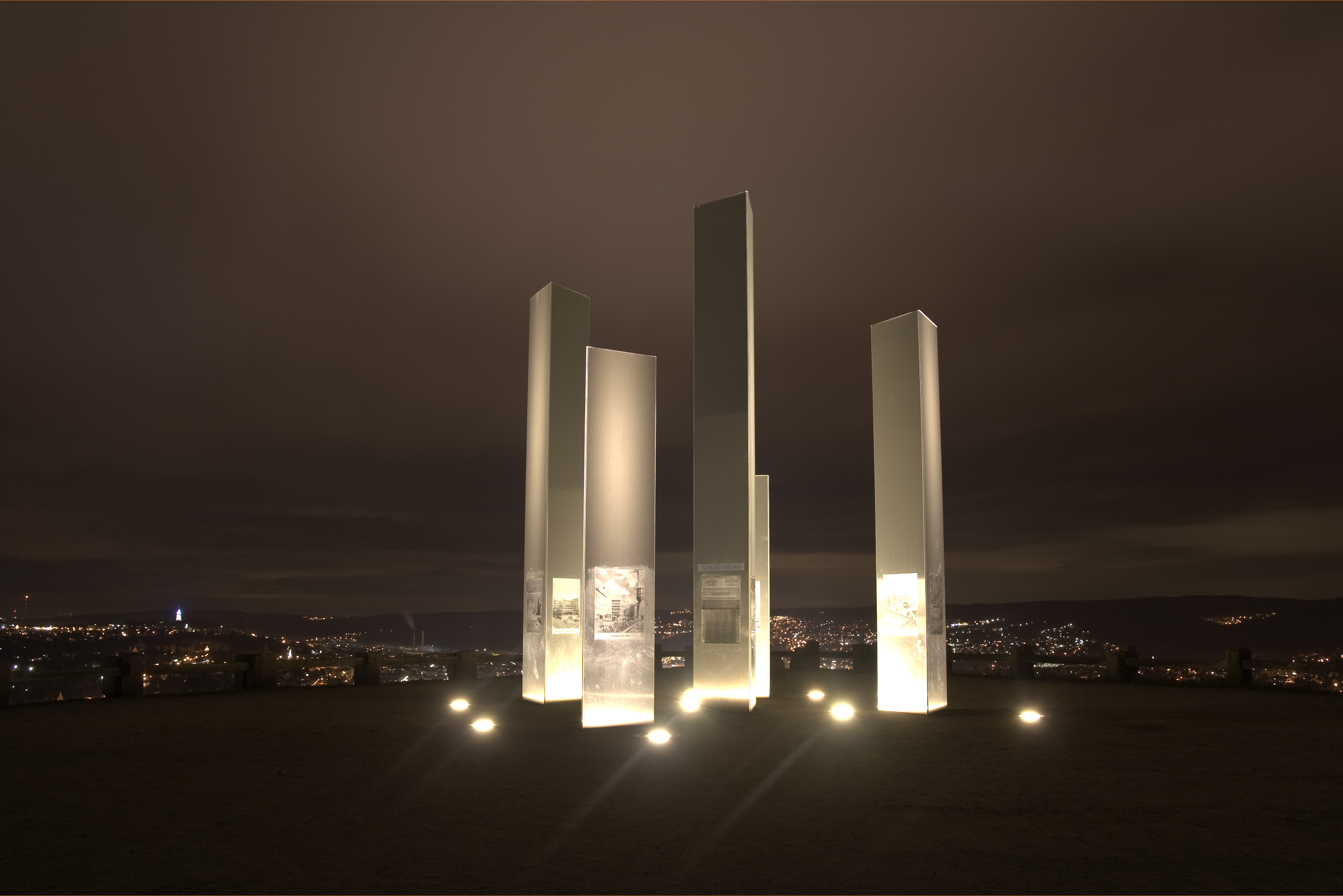 Stelen auf dem Pforzheim Wallberg bei Nacht